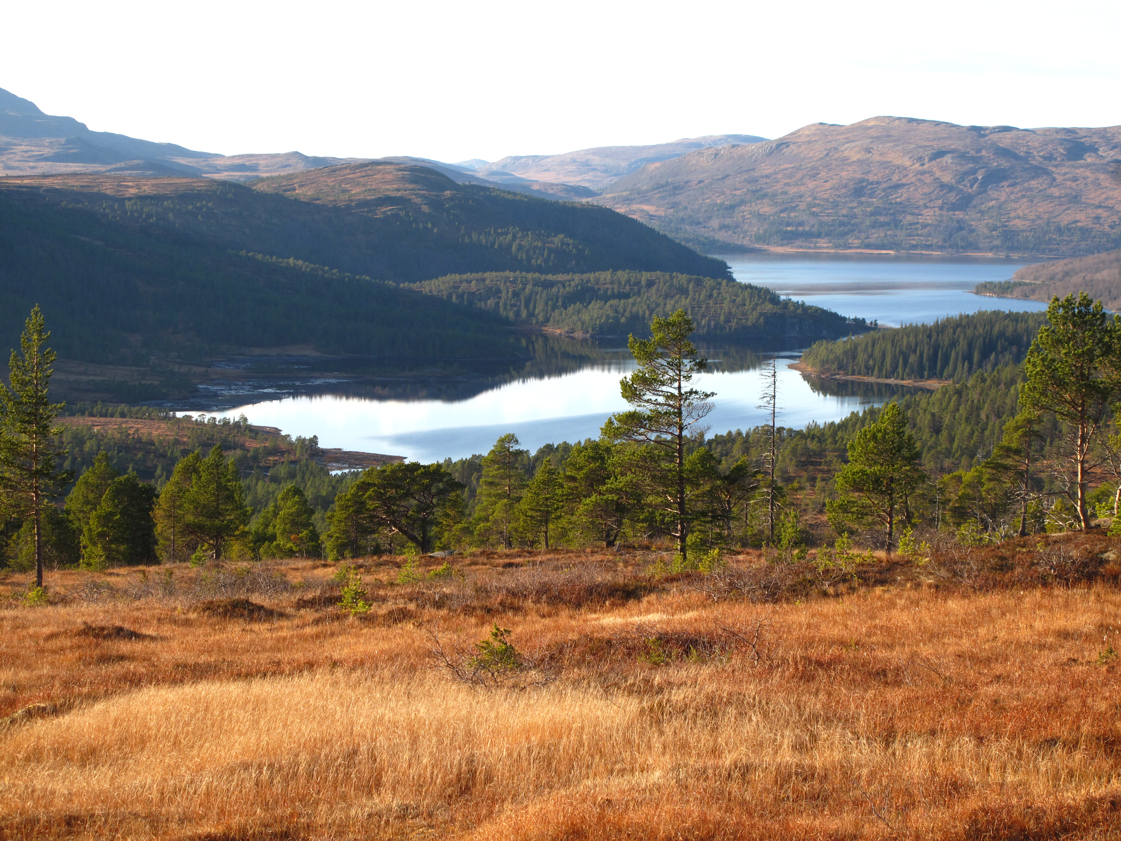 Orginalbeskrivelse: "På vei opp mot Grønlikammen" Våvatnet sett fra øst